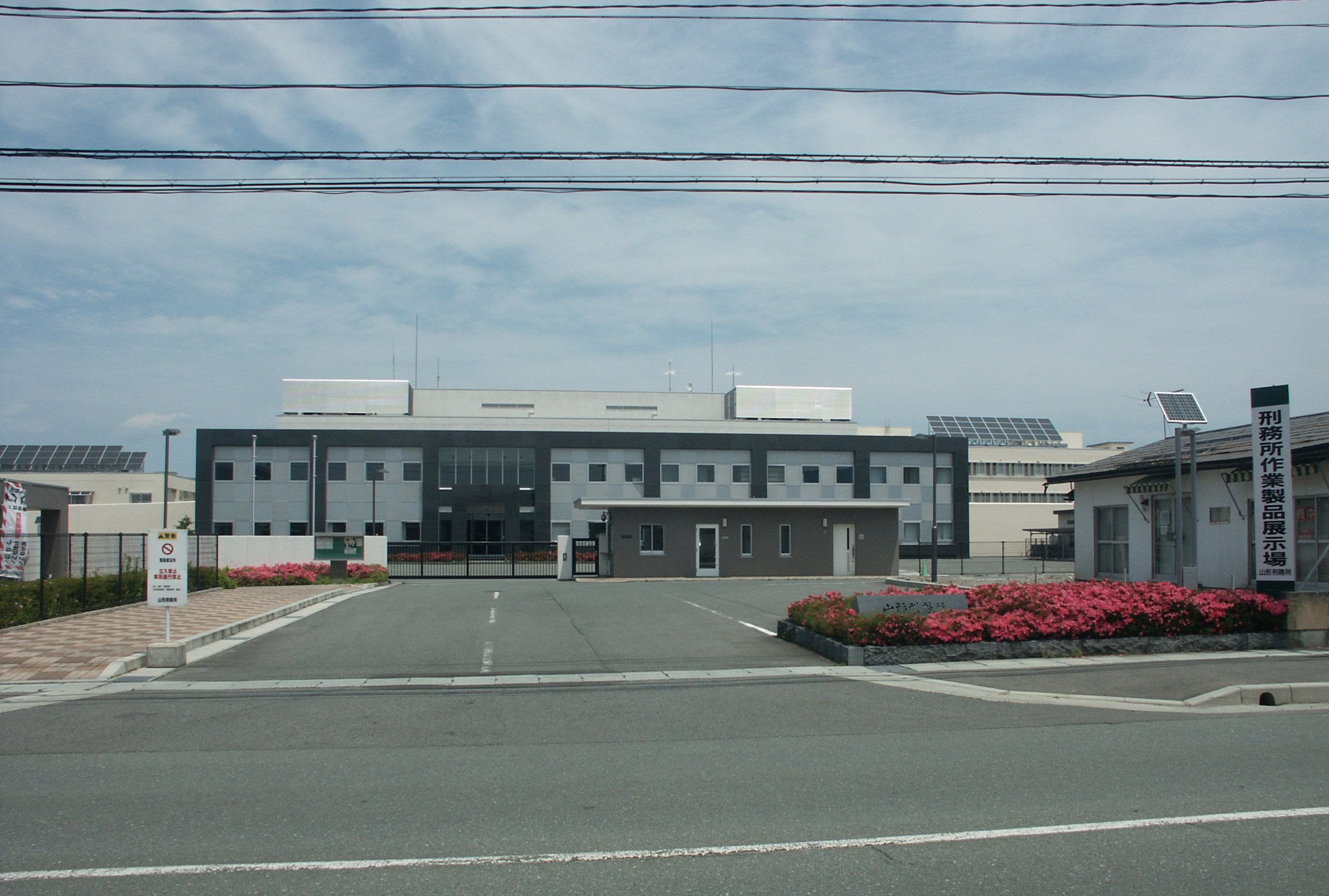 山形刑務所（正門付近）